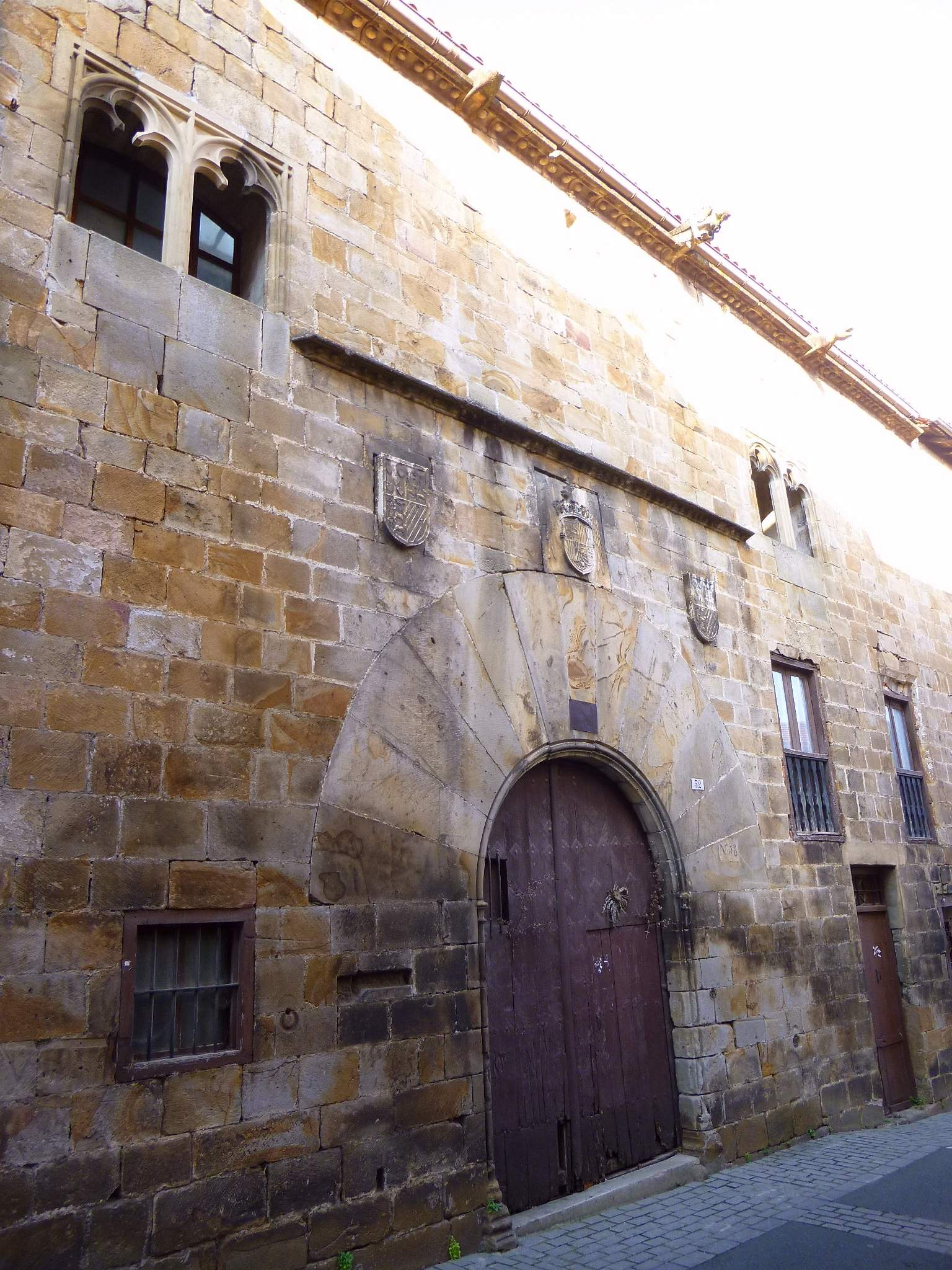 Gebara jauregia (Segura, Gipuzkoa)